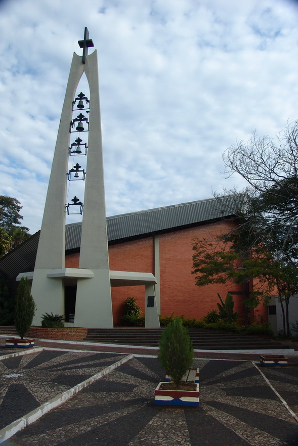 Imagem da igreja de Santo Antônio de Pádua, município de Salto do Itararé, estado do Paraná, Brasil.